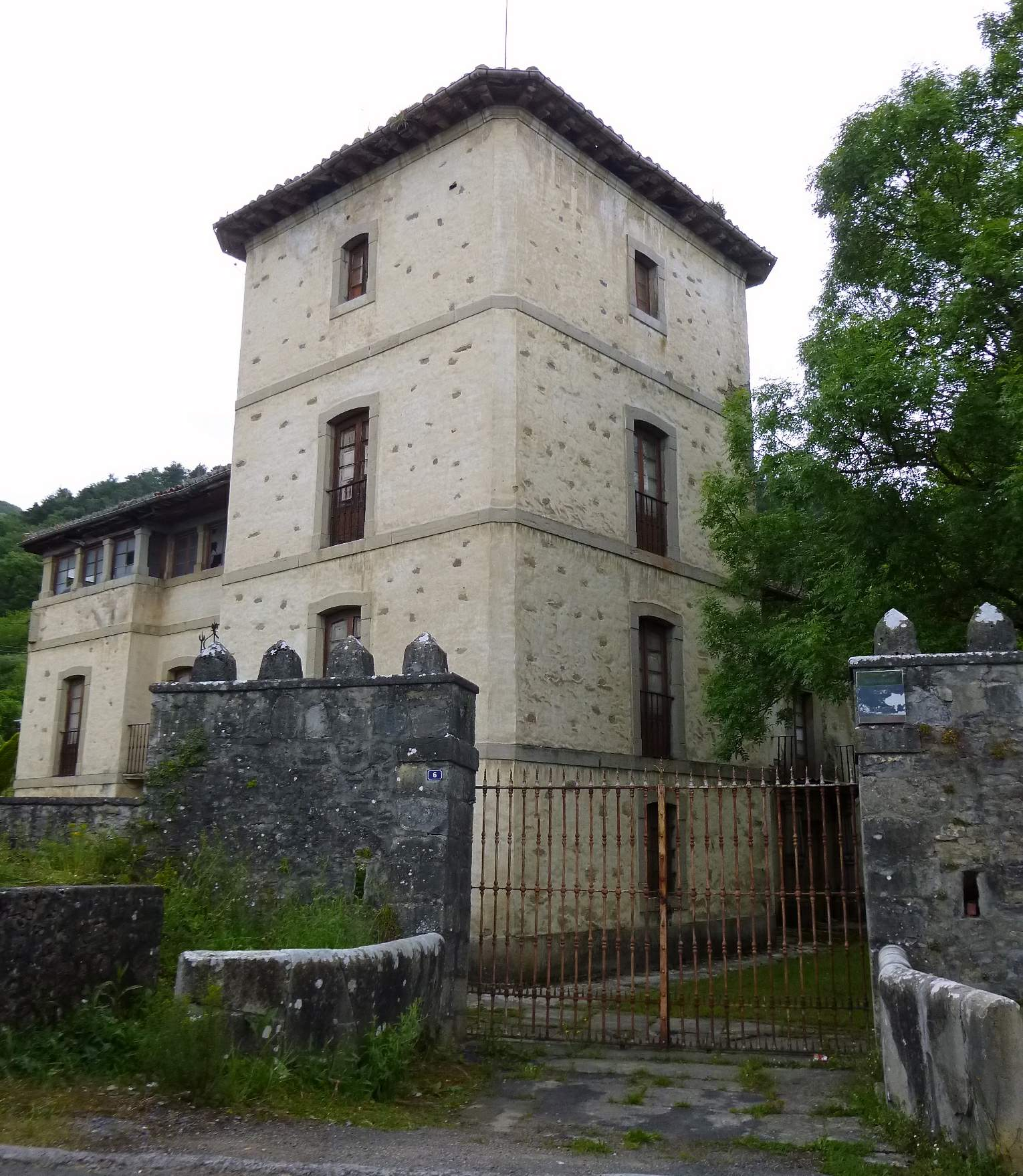 Palacio Atxa (Arespalditza, Álava)